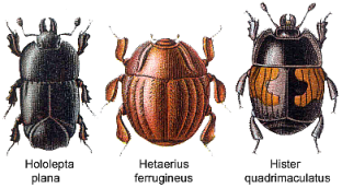 Histeridae spec., Quelle: Reitter, E.: Fauna germanica,Bd.II, Stuttgart,1909